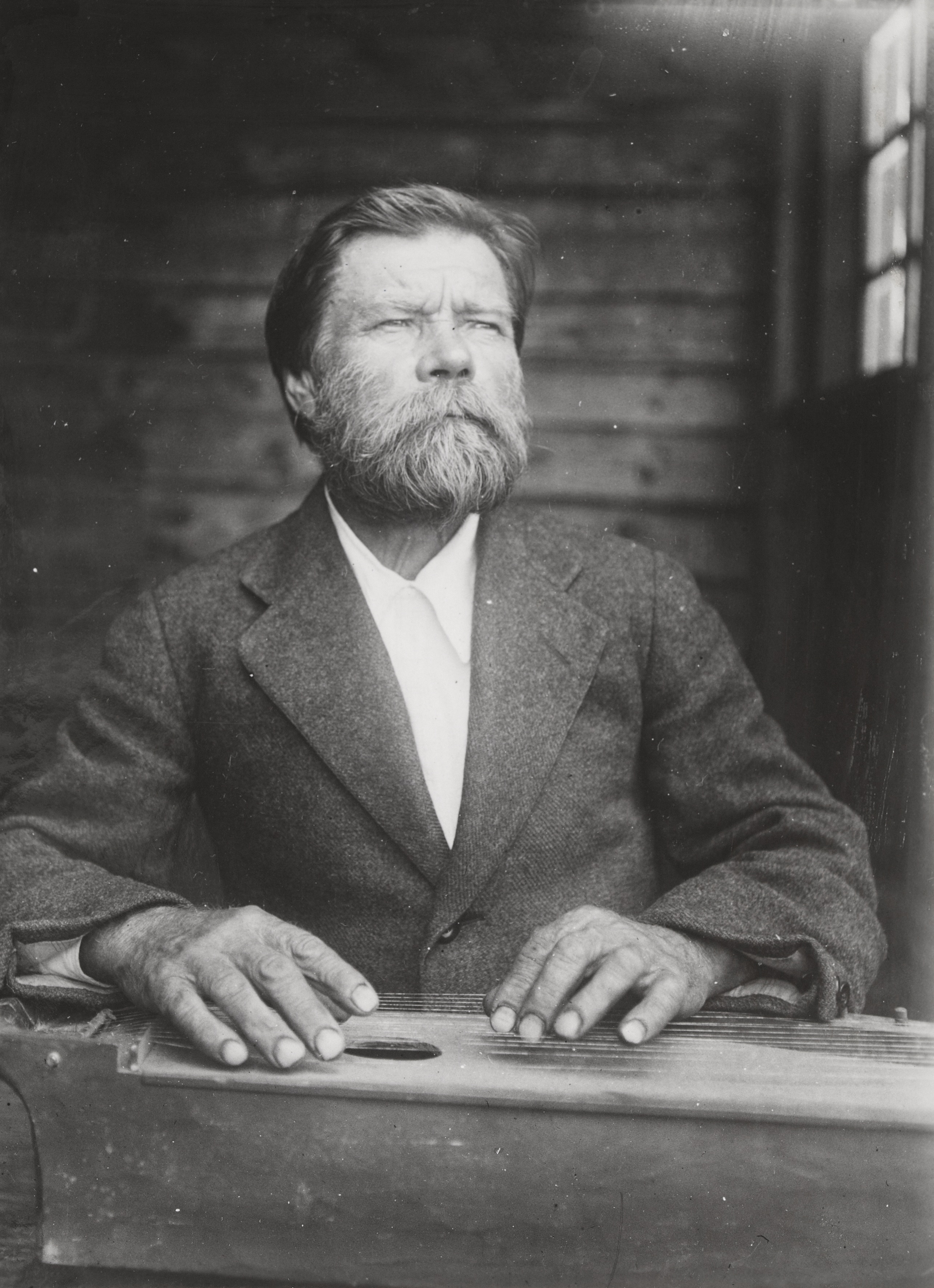 Runonlaulaja Iivana Härkönen 1917